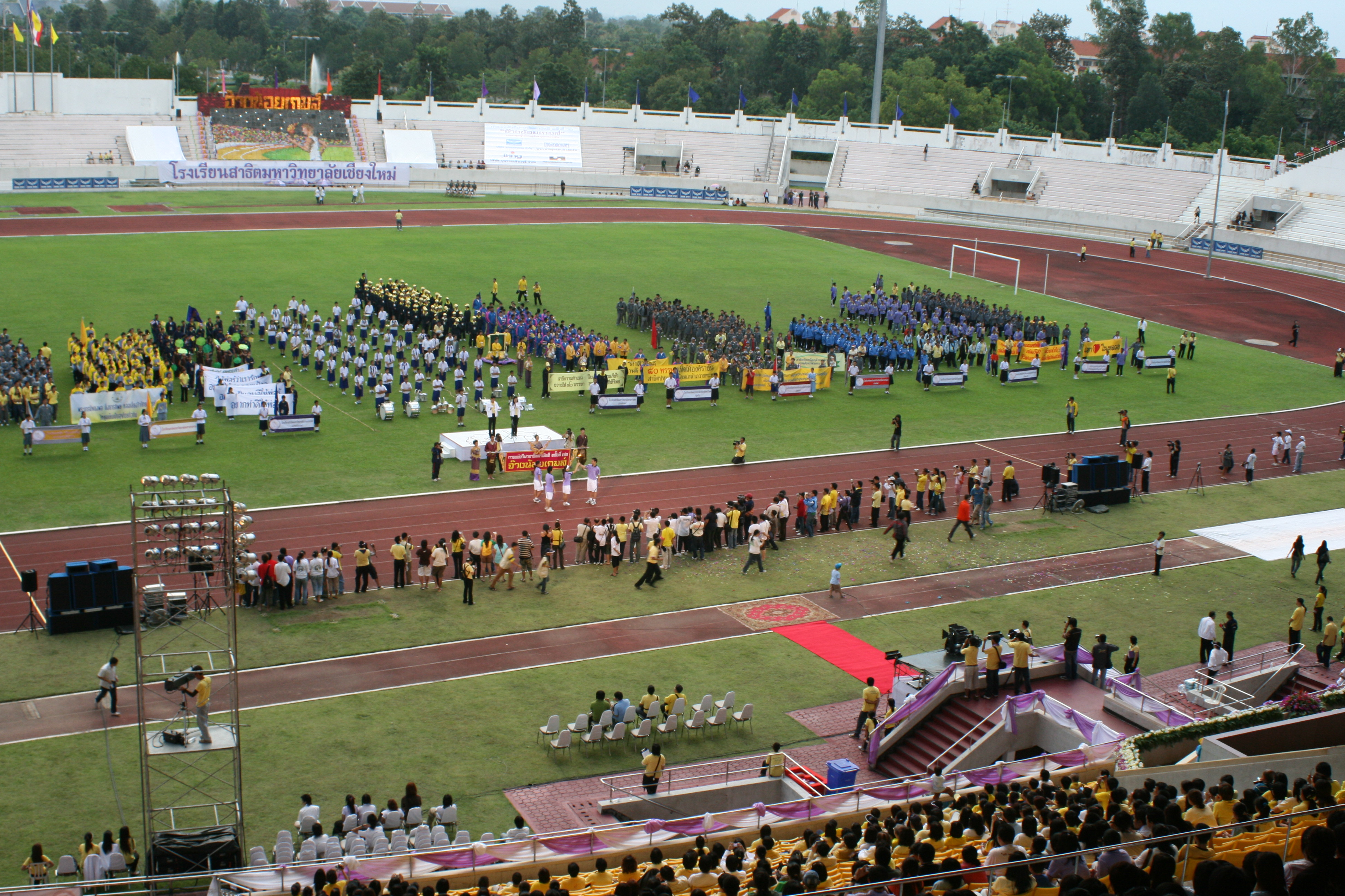 Satit Samakkee at Chiang Mai